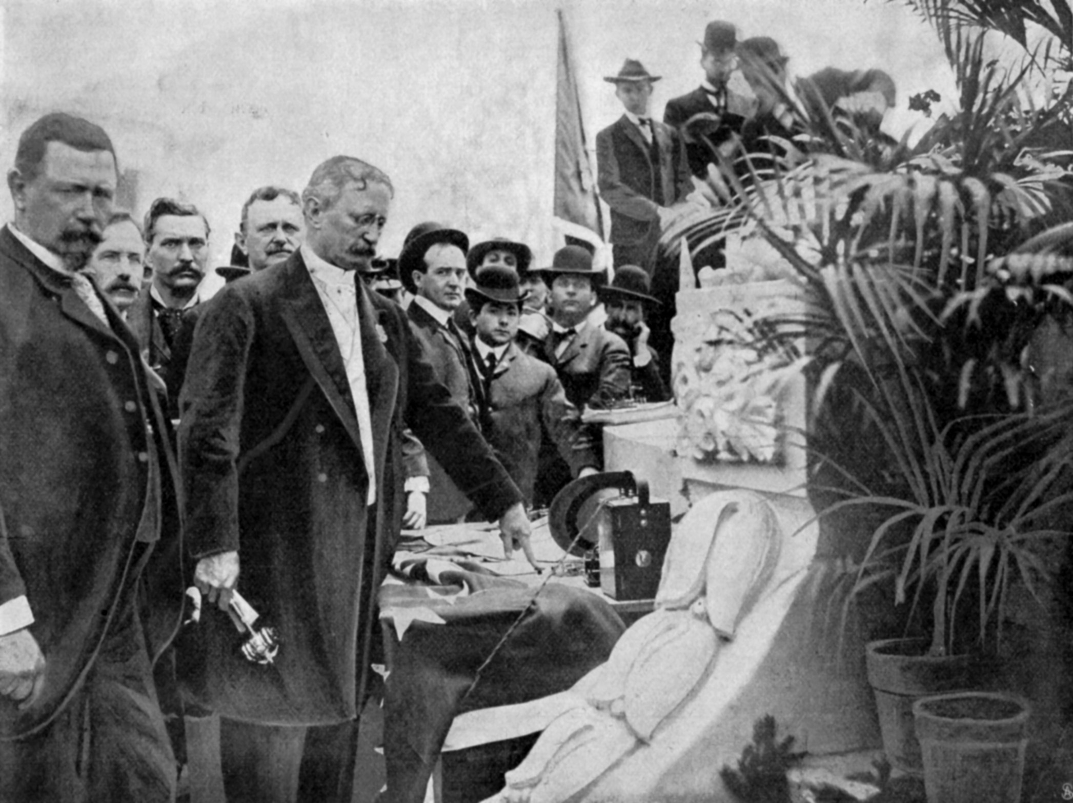 David Francis, Präsident der Weltausstellung von St. Louis (1904) eröffnet die Ausstellung mit der Auslösung eines Signals in das Weiße Haus zu Präsident Theodore Roosevelt. In der Hand hält Francis den goldenen Schlüssel der Ausstellung.